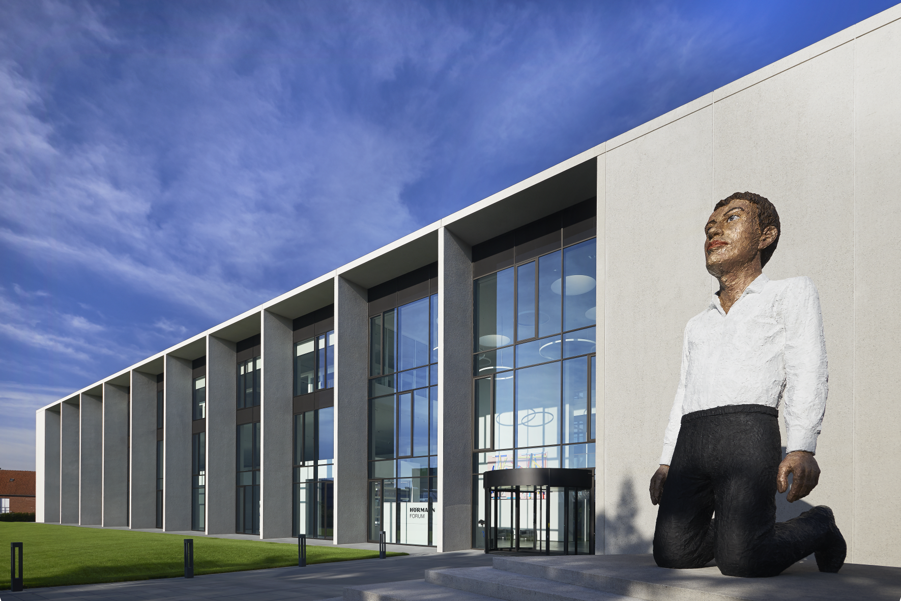 Das Hörmann Forum